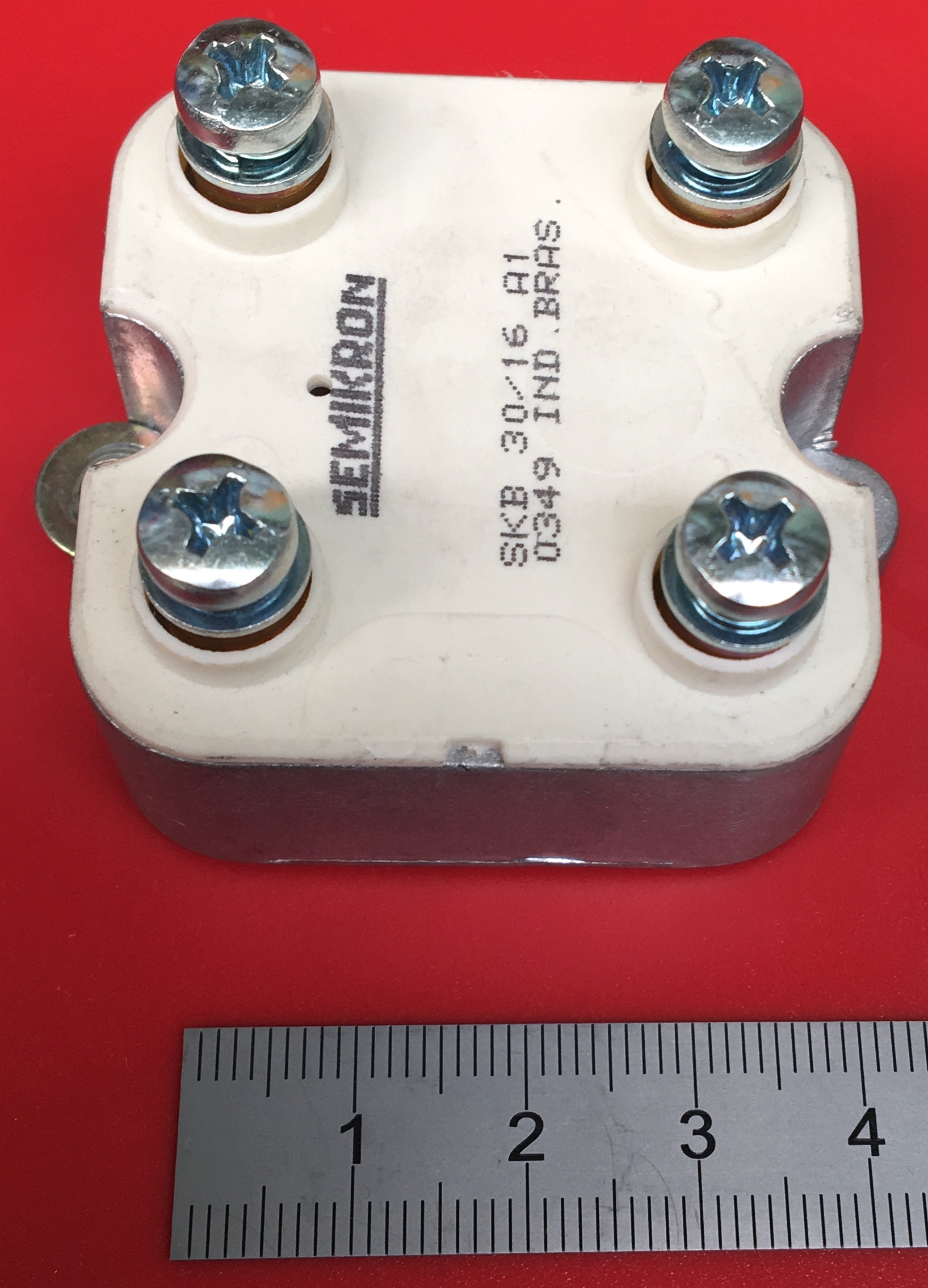 Pont de diode semikron SKD monophasé 30A 1600V